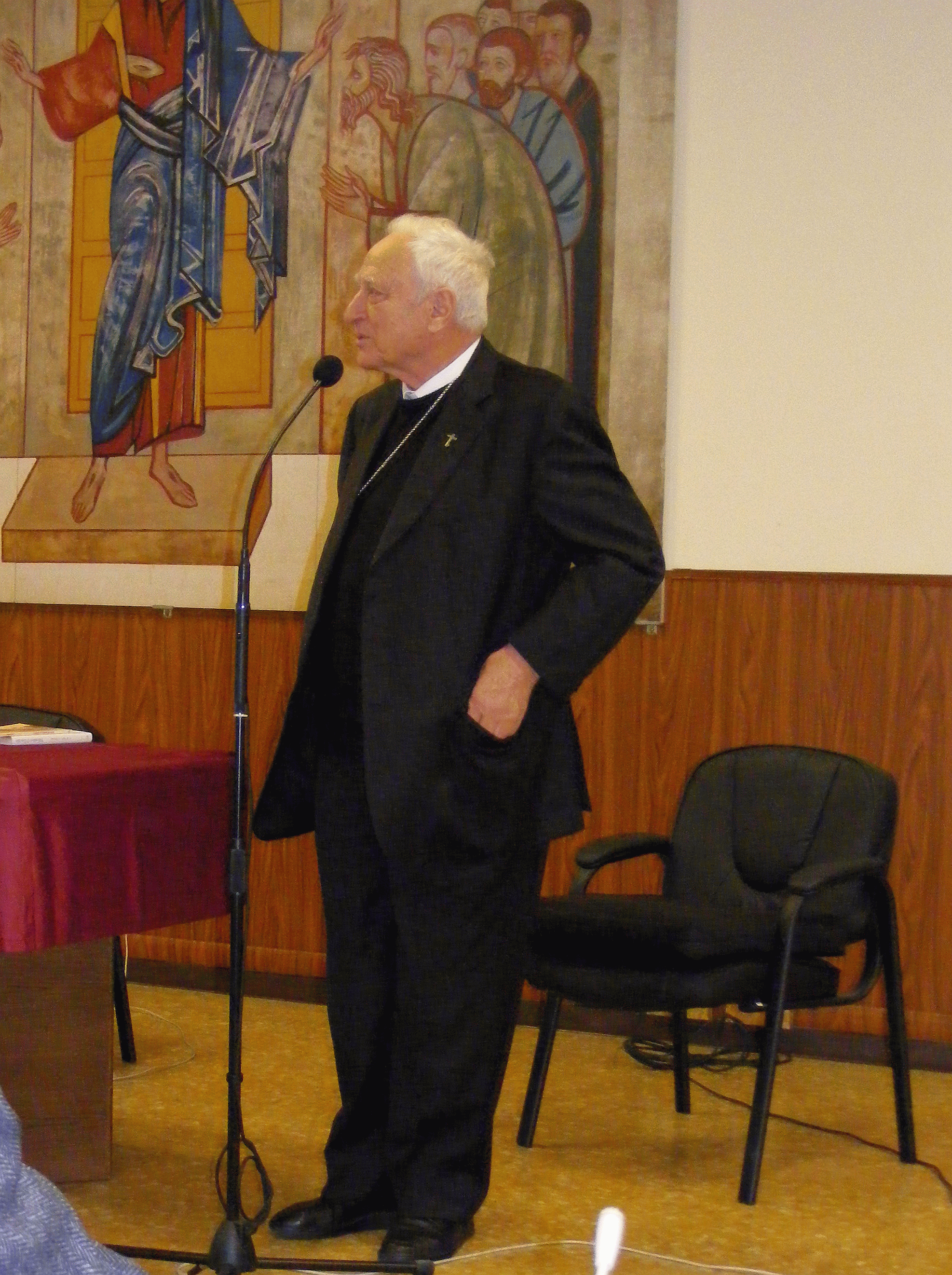 Monsignor Luigi Bettazzi a un dibattito nella sede torinese del Gruppo Abele